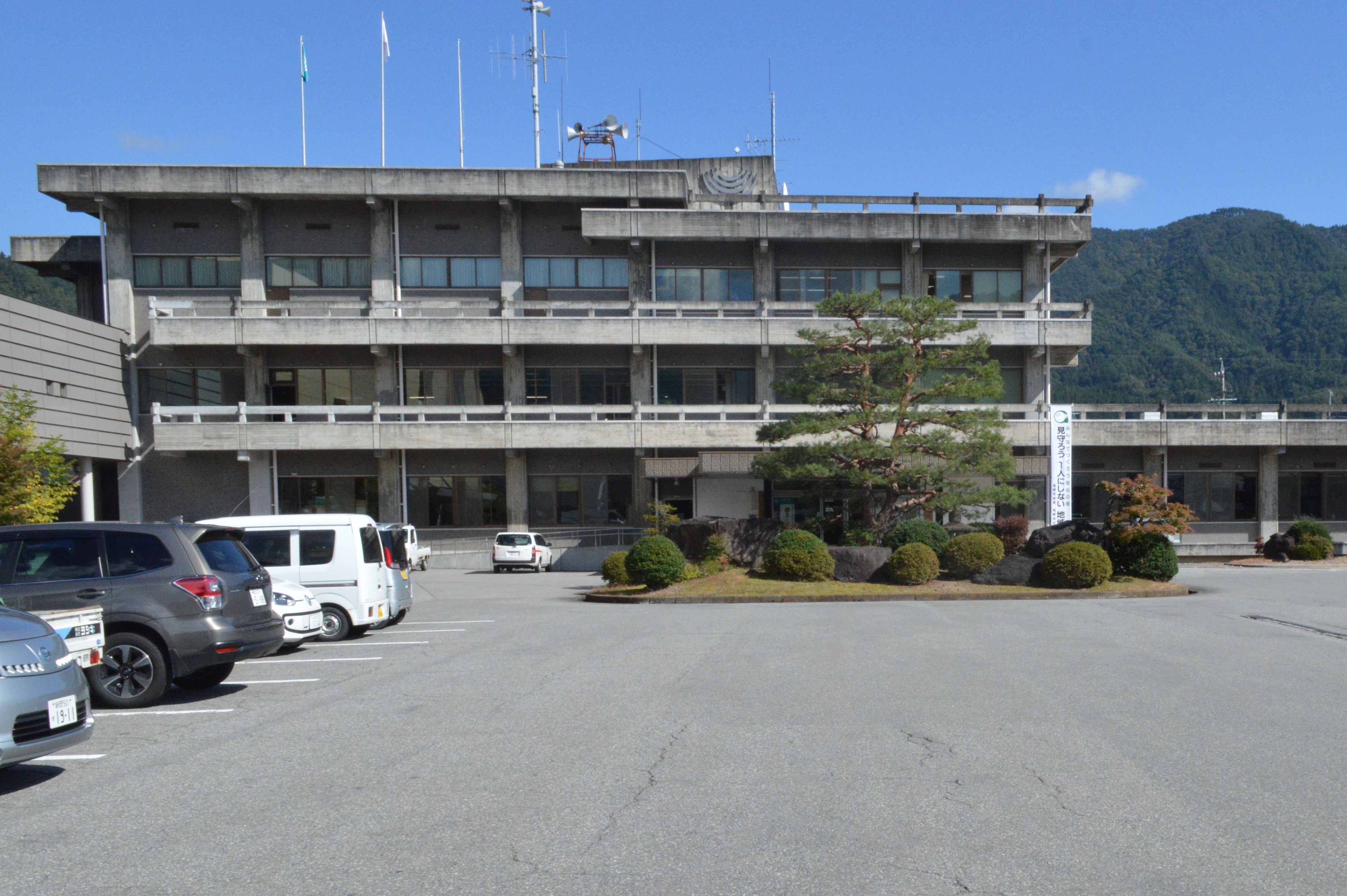 飛騨市役所本庁舎。